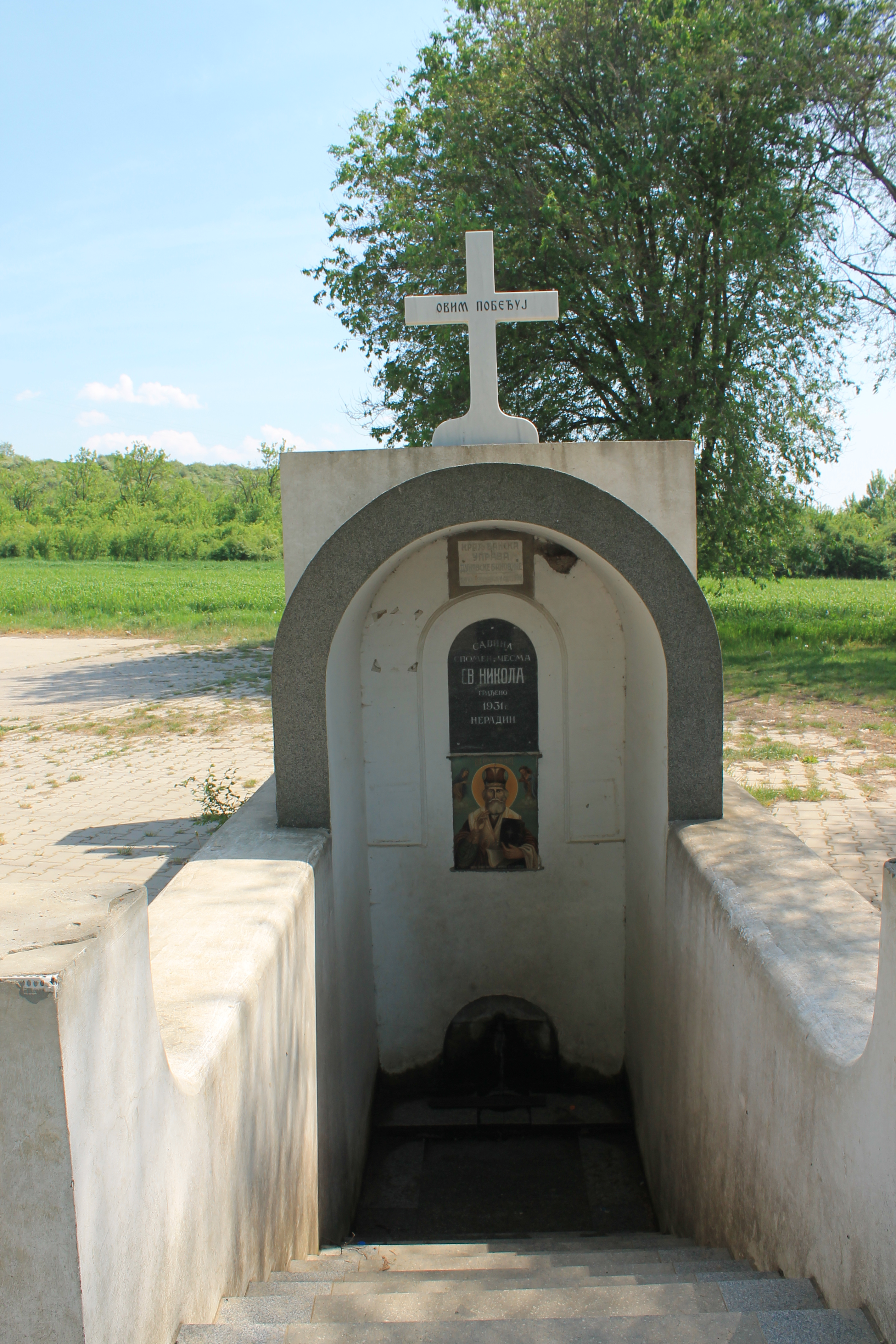 Savina spomen-česma